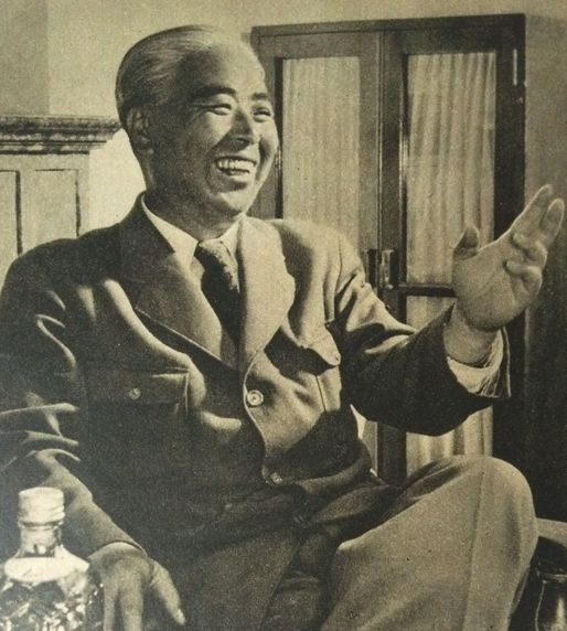 木下郁さん